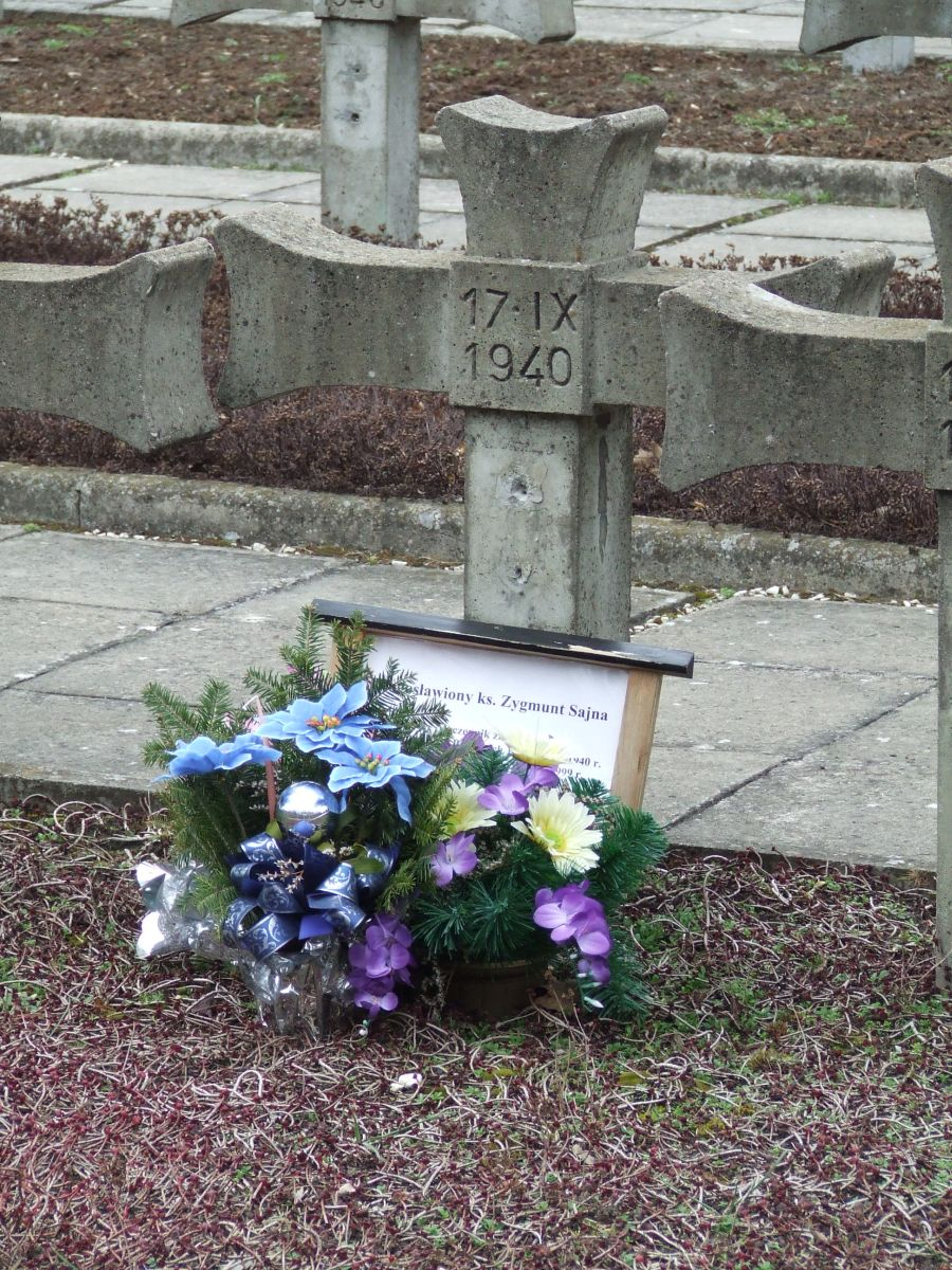 Palmiry, bł. ks. Zygmunt Sajna